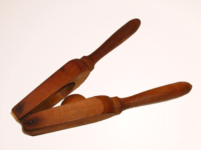 alte Zitruspresse